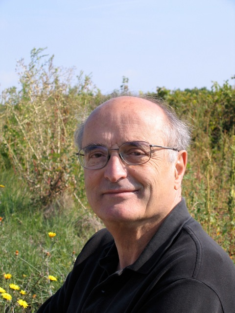 Daniel Pécaut